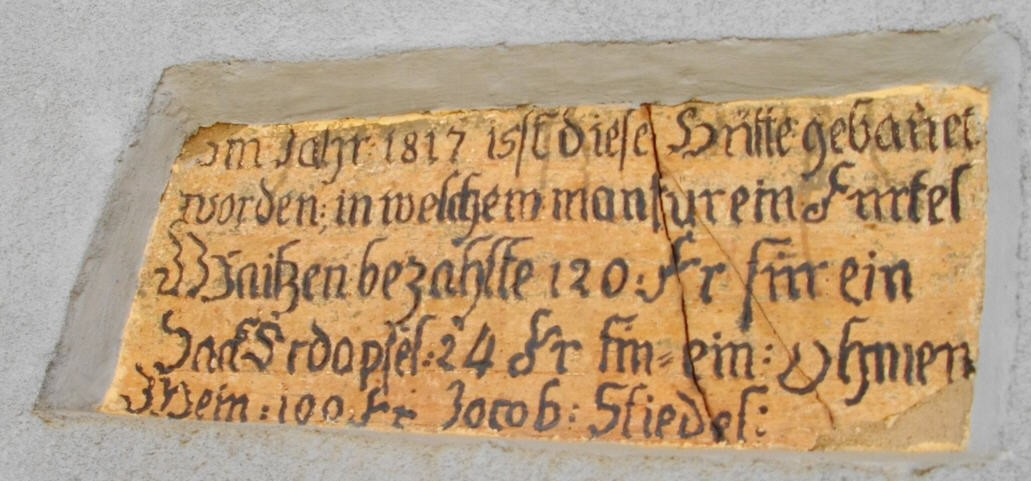 Inscription sur un mur (Heiligenstein, Bas-Rhin) rappelant la terrible année de la faim 1816.